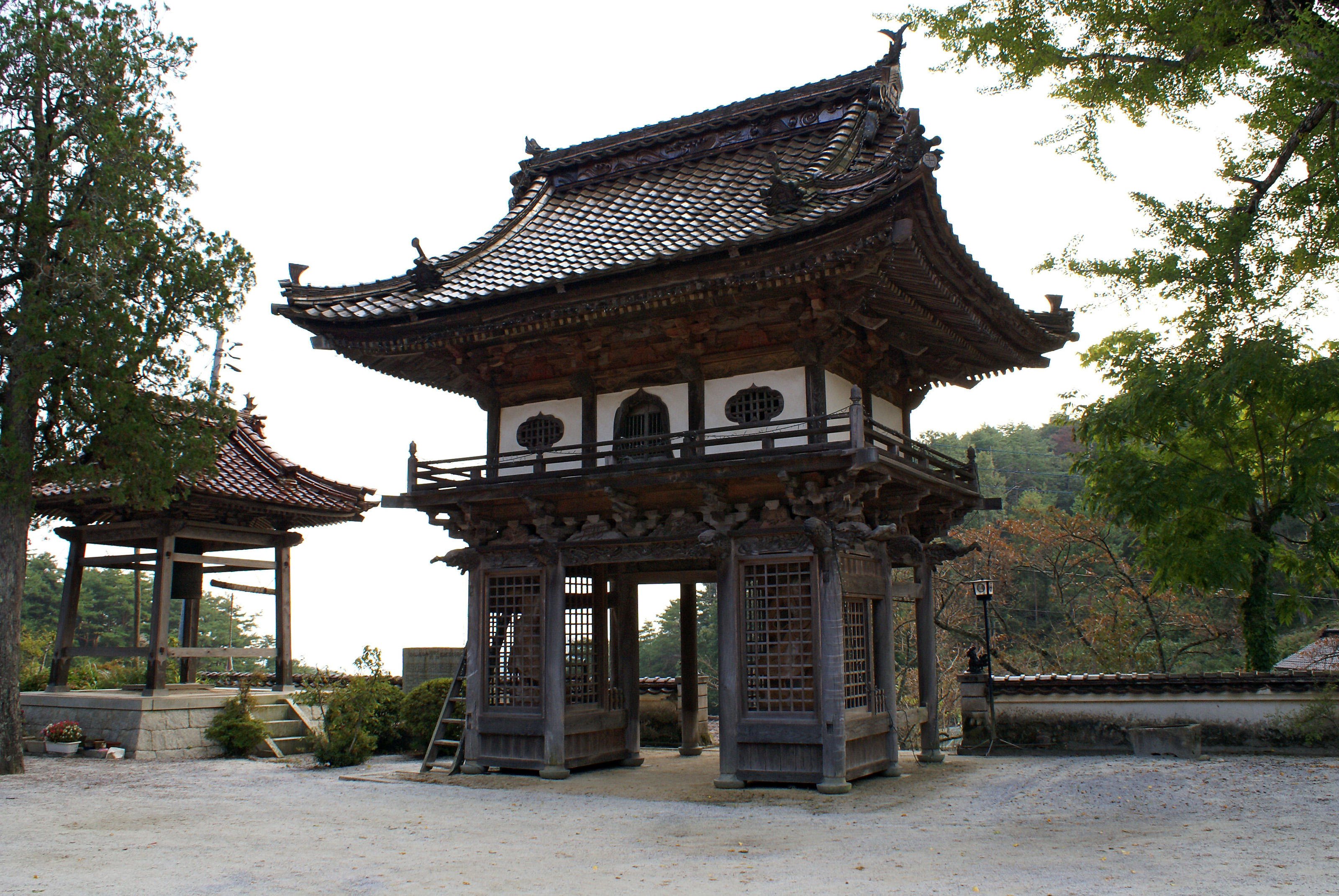 Enmeiji in Takahashi, Okayama, Japan